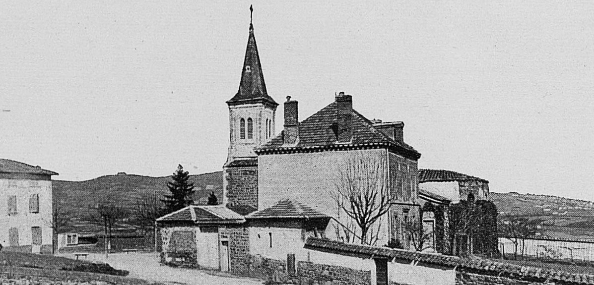 Dictionnaire illustré des communes du département du Rhône. Tome 1 / par MM. E. de Rolland et D. Clouzet.